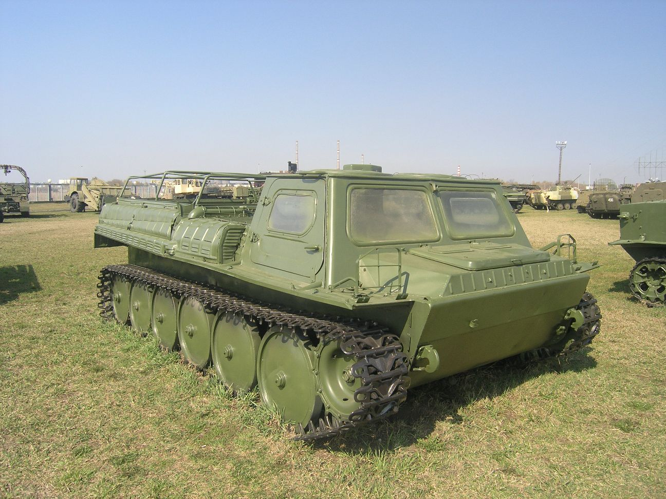 ГТ-СМ (ГАЗ-71) в Техническом музее Тольятти